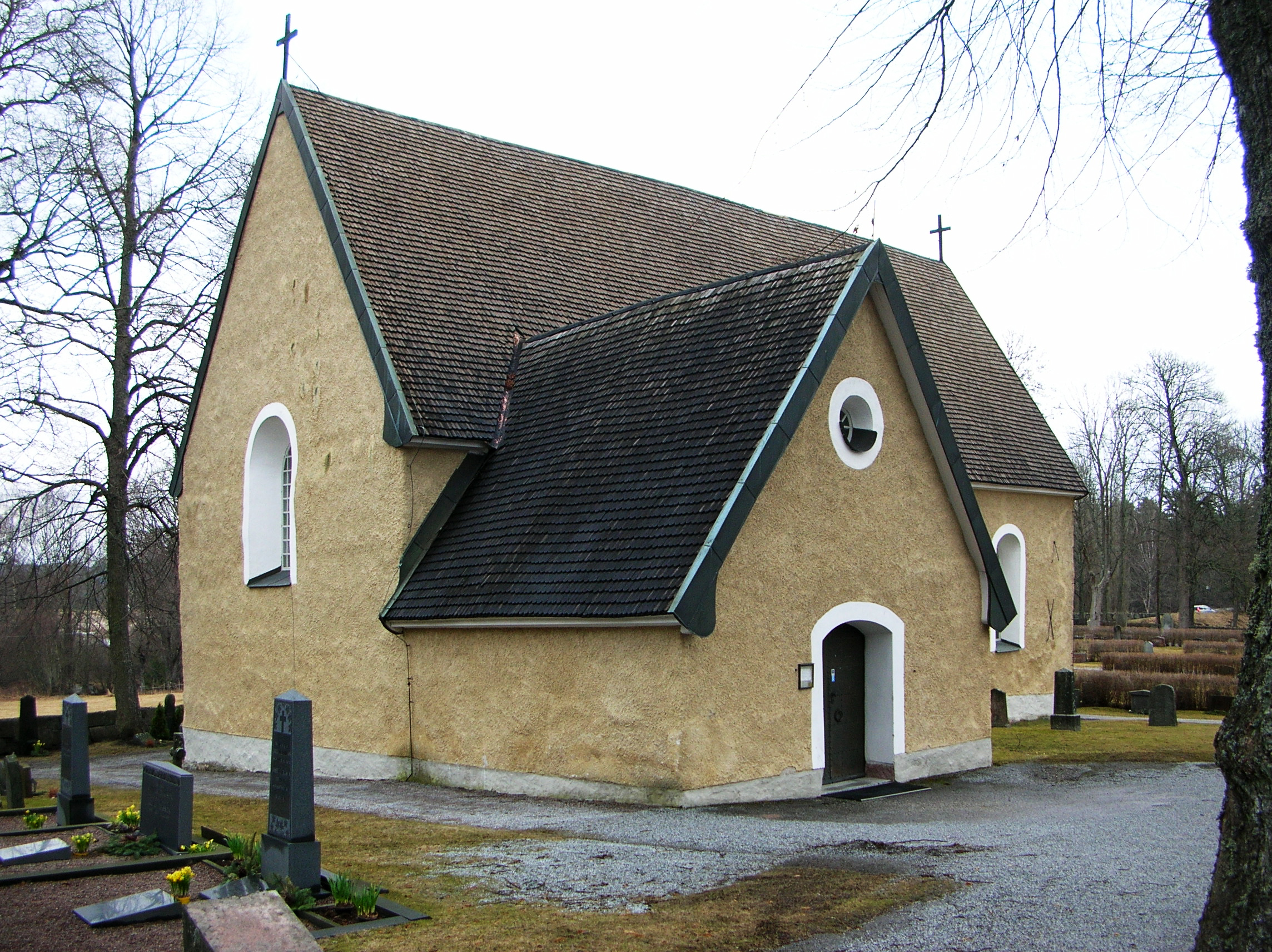 Hammarby kyrka, Sollentuna, Diocese of Stockholm